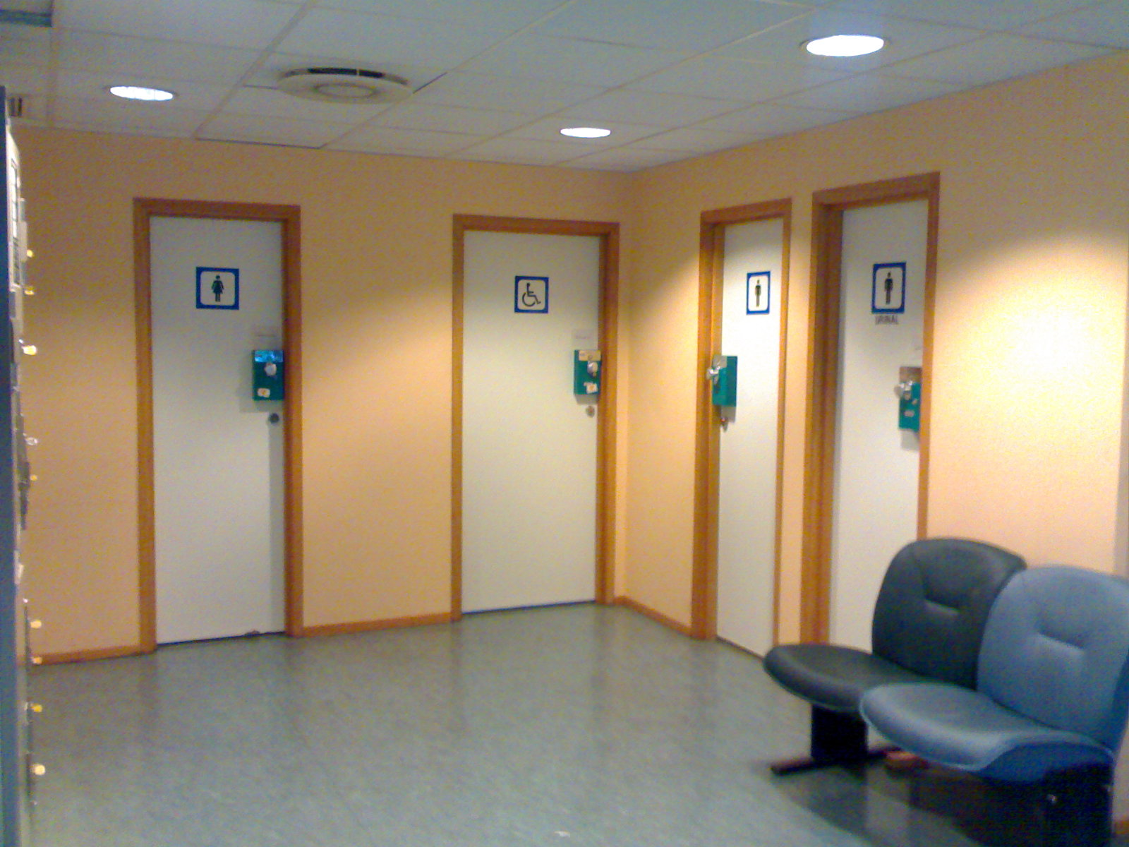 Toalett på Førde rutebilstasjon.